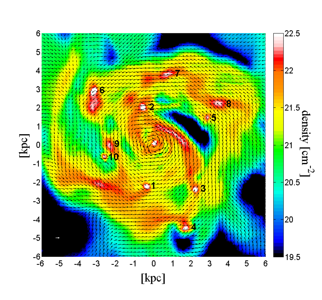 אי-יציבות גרביטציונית בגלקסית דיסקה ביקום המוקדם, על פי הדמיית מחשב קוסמולוגית הידרודינמית (דקל ועמיתיו, 2011 ).